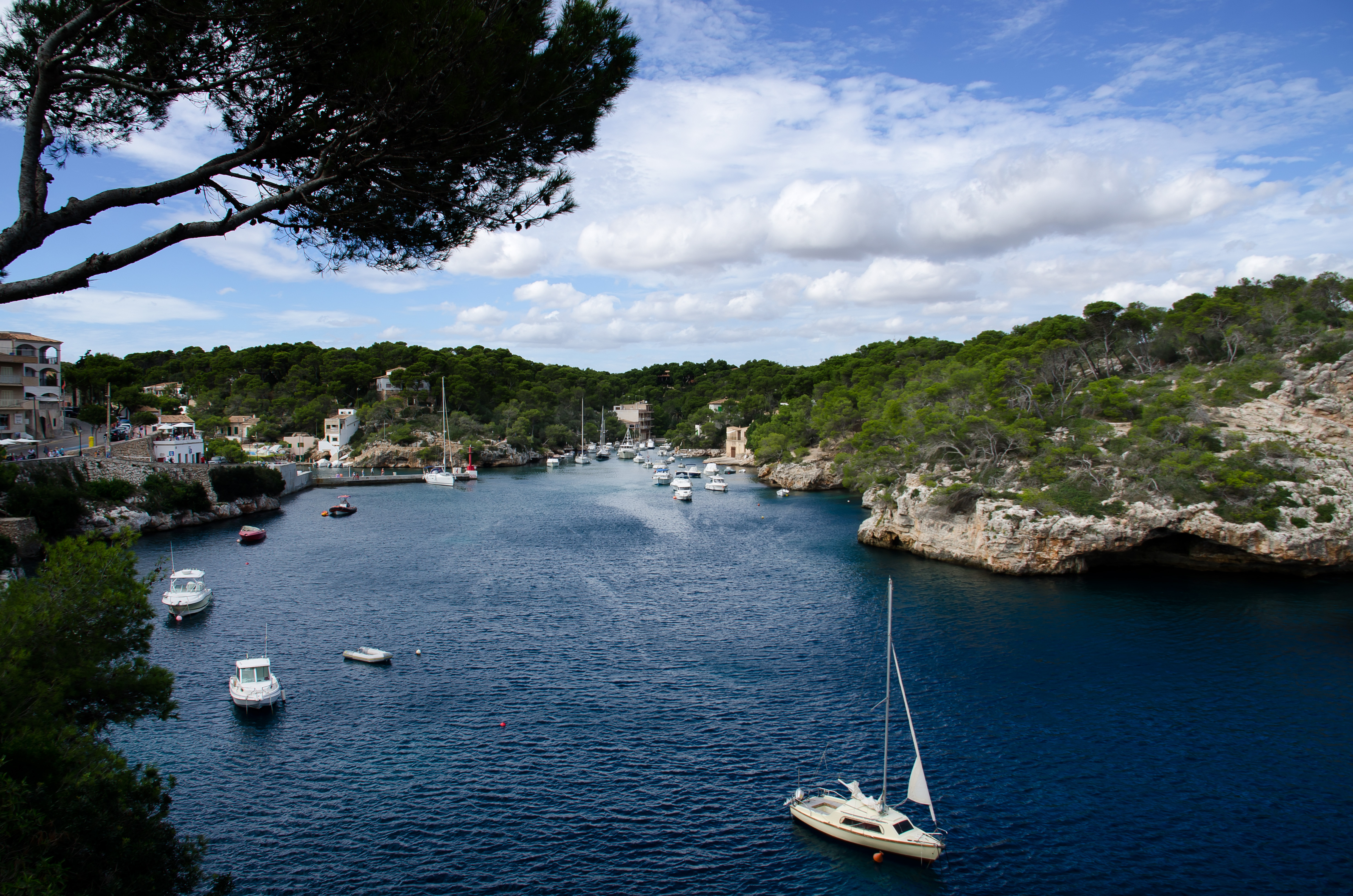 Cala Figuera, Mallorca